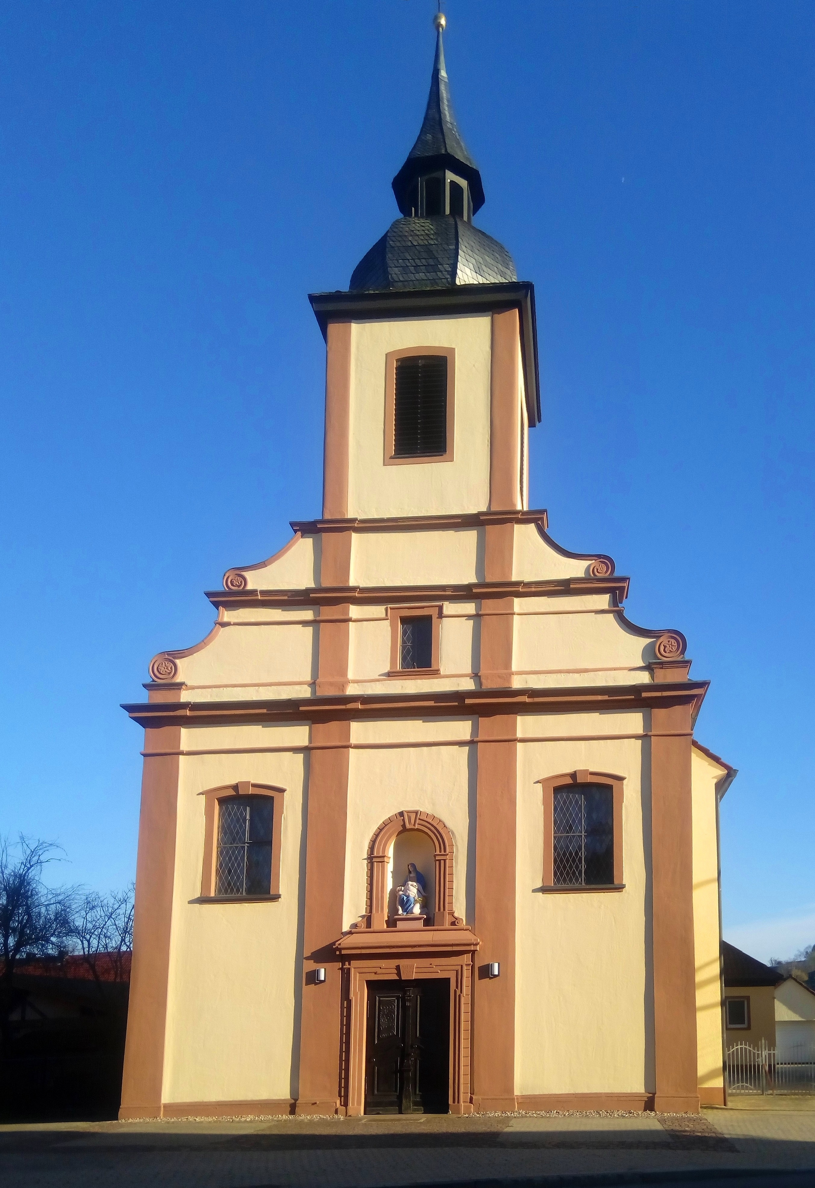 Eubigheim, kath. Kirche St. Maria